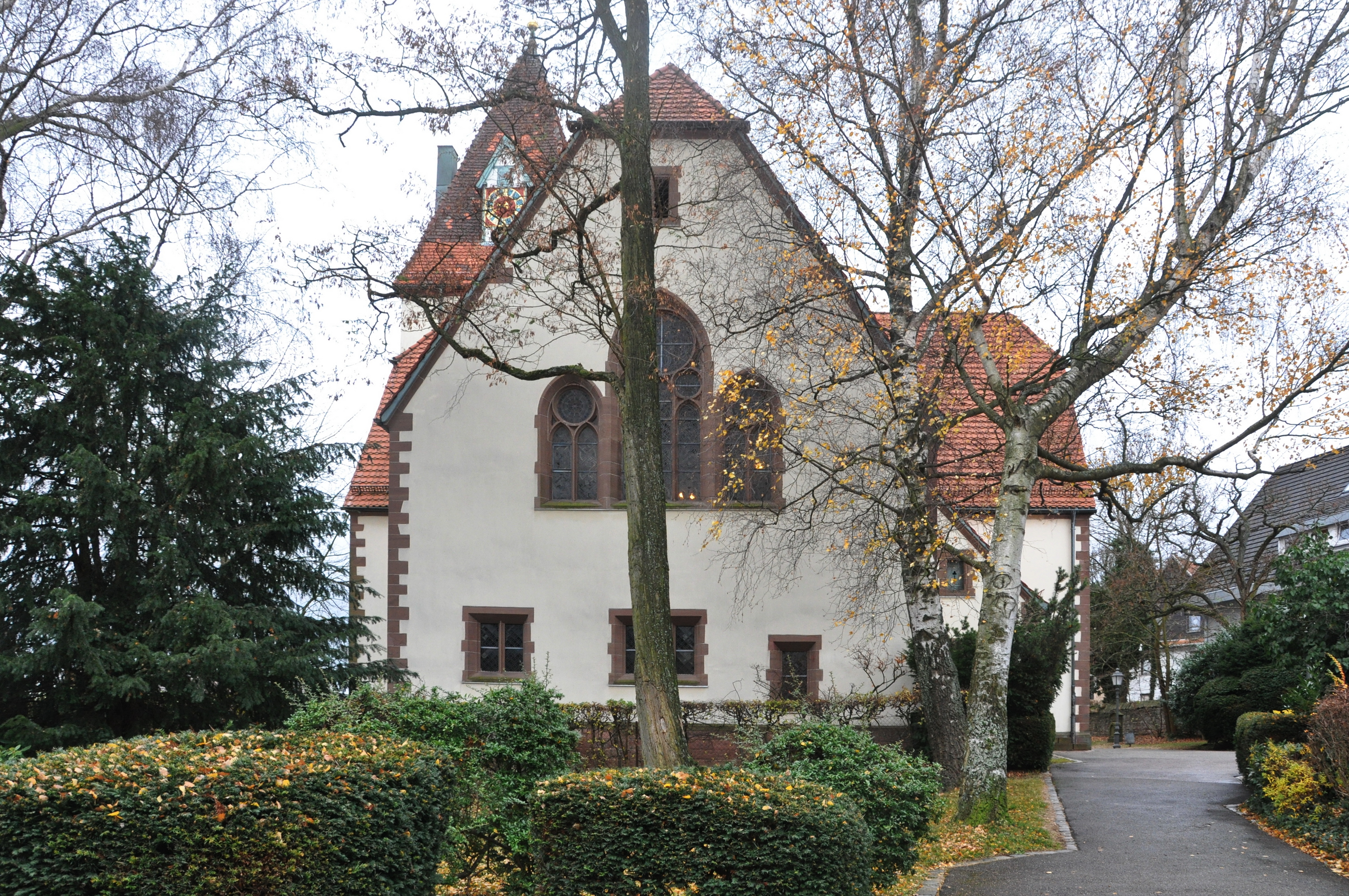 evang. Bergkirche in Büchenbronn Ansicht von Norden